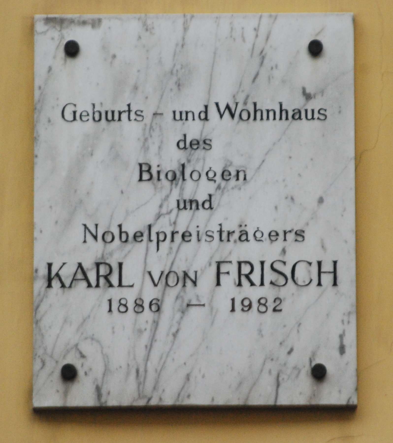 Gedenktafel für Karl von Frisch in der Josefstädter Straße in Wien-Josefstadt